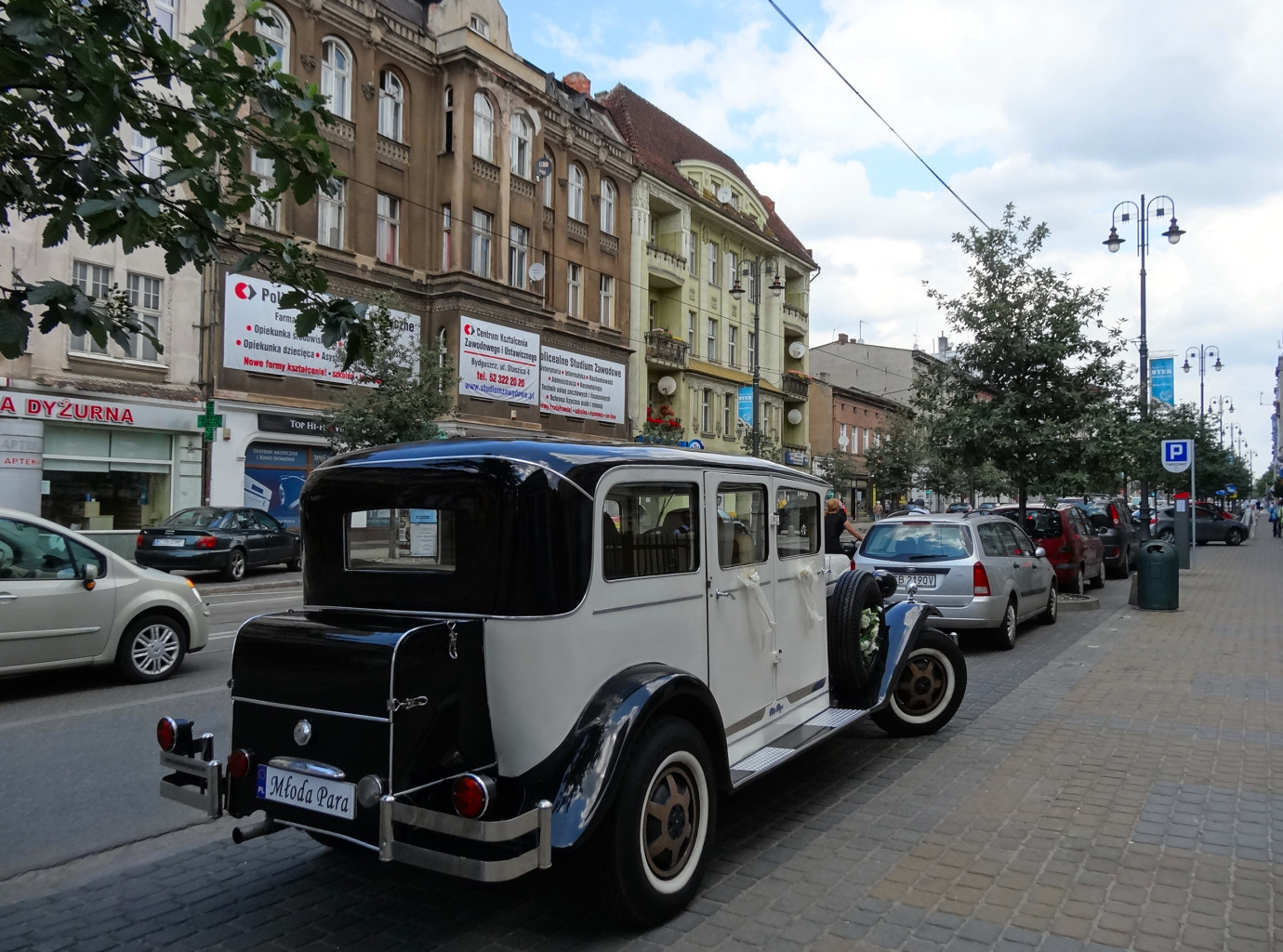 Ulica Gdańska w Bydgoszczy na odcinku od ul. Cieszkowskiego do ul. Świętojańskiej